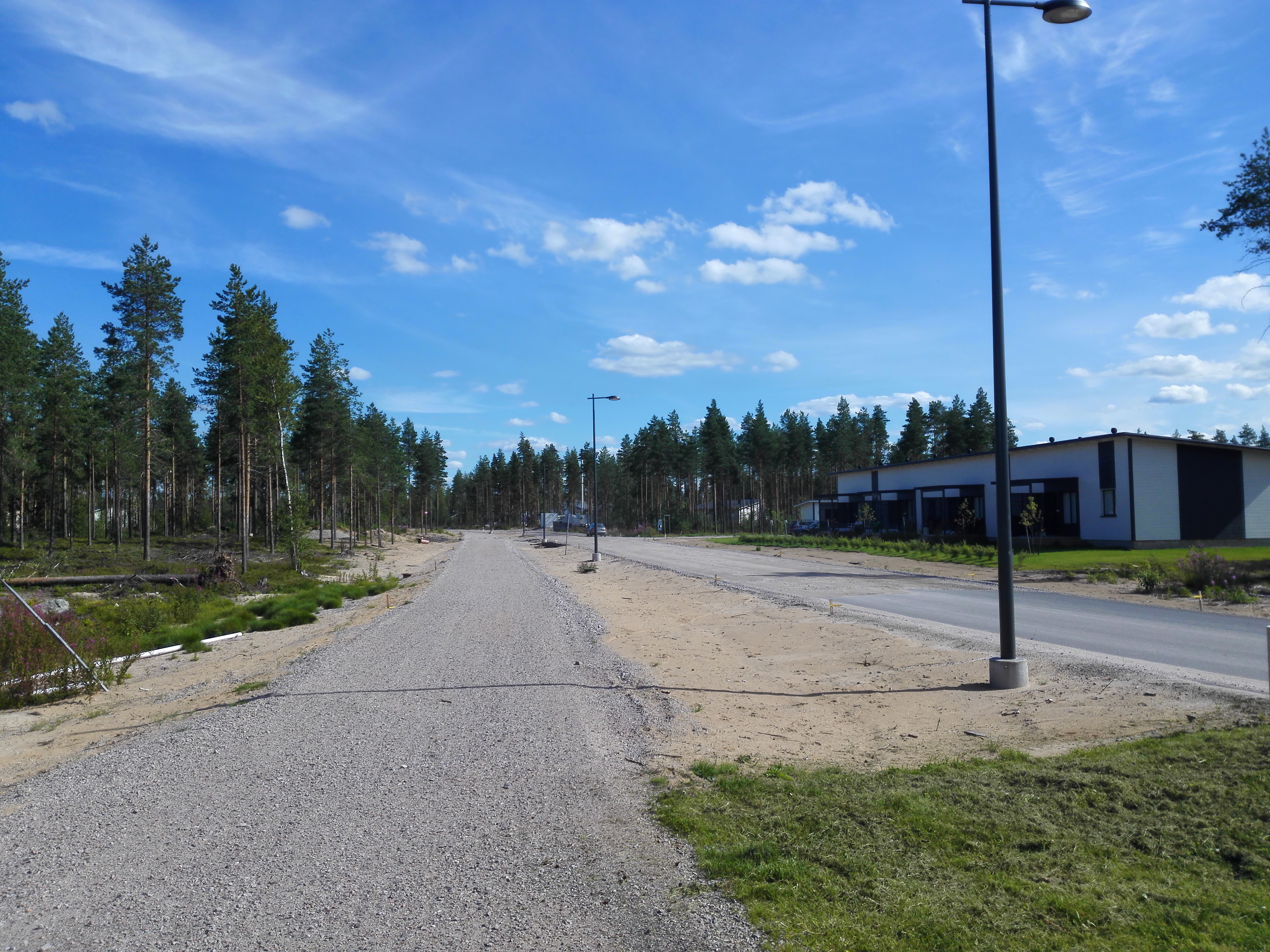 Näkymä Kempeleen Metsärinteen asuinalueen vielä osittain rakentamattomalle alueelle. Näkymä Hovimetsän ja Metsärinteentien risteyksestä idän suuntaan.